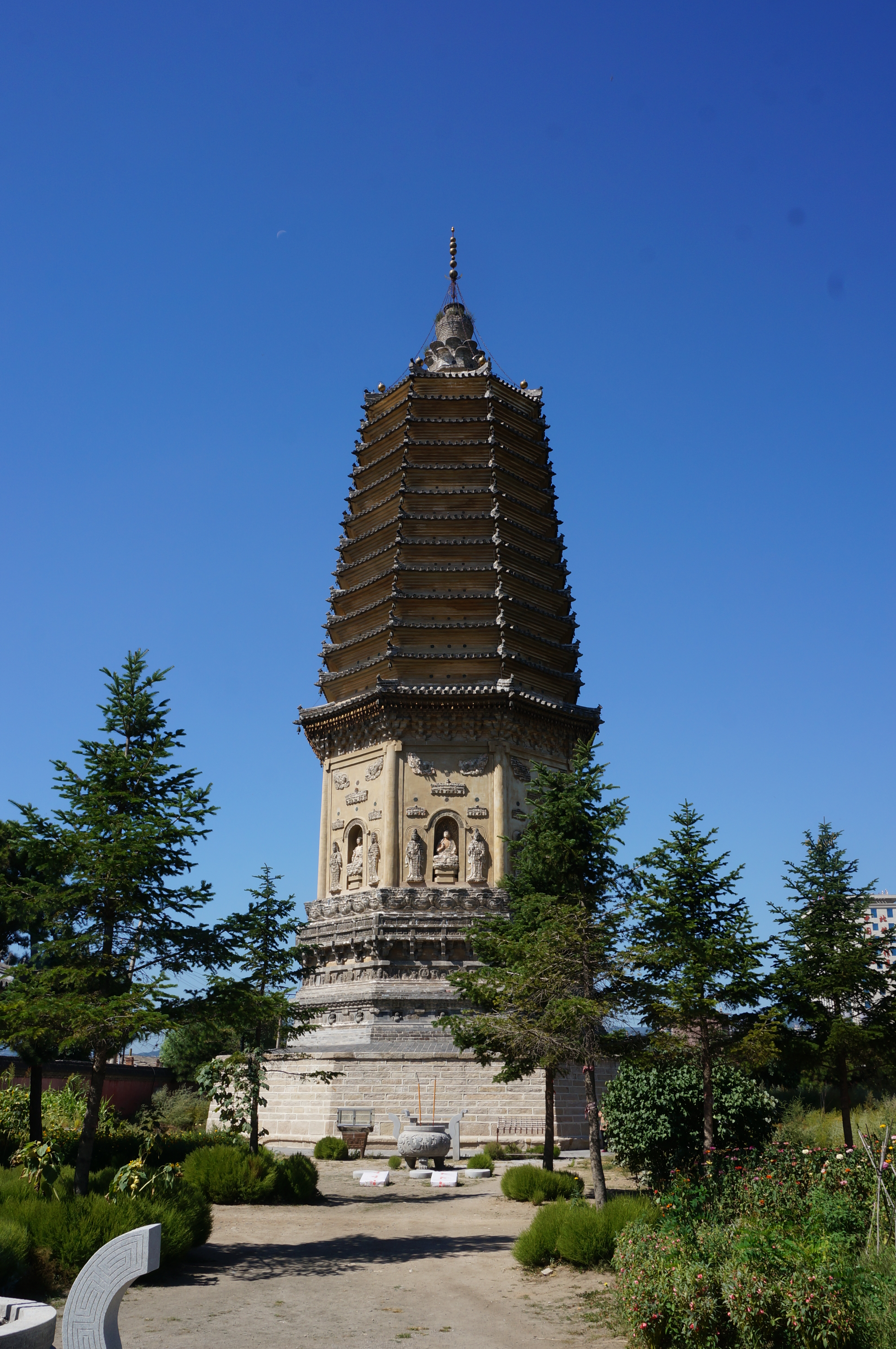 北镇崇兴寺双塔，西塔东面。